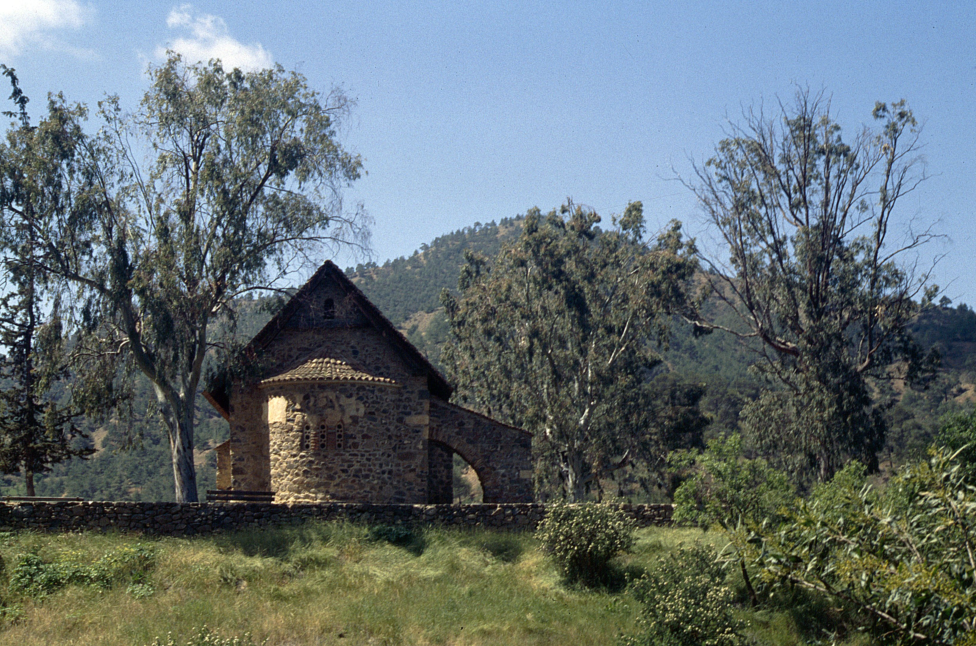 Nikitari: Asinou, Panagia Phorbiotissa